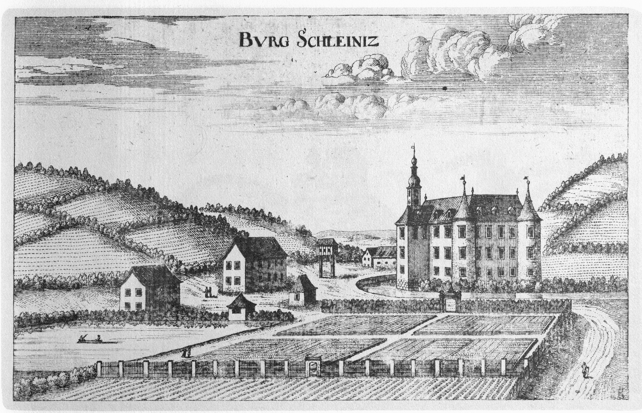 G. M. Vischers Käyserlichen Geographi, Topographia Ducatus Stiriae, Das ist: Eigentliche Delineation / und Abbildung aller Städte / Schlösser / Marcktfleck / Lustgärten / Probsteyen / Stiffter / Clöster und Kirchen / so es sich im Herzogthumb Steyrmarck befinden; Und anjetzo Umb einen billichen Preyß zu finden seynd Bey Johann Bitsch Universitäts Buchhandlern / Auff dem Juden=Platz bey der guldenen Saulen. Graz 1681 Die Nummerierung der Dateien folgt der alphabetischen Reihung der Ortsnamen und entspricht nicht dem Vischer-Register